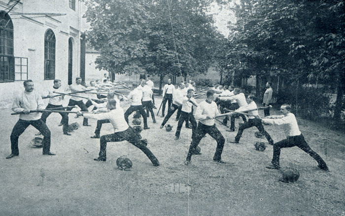 Bajonettfechten im k.u.k. Militär Fecht- und Turnlehrerinstitut